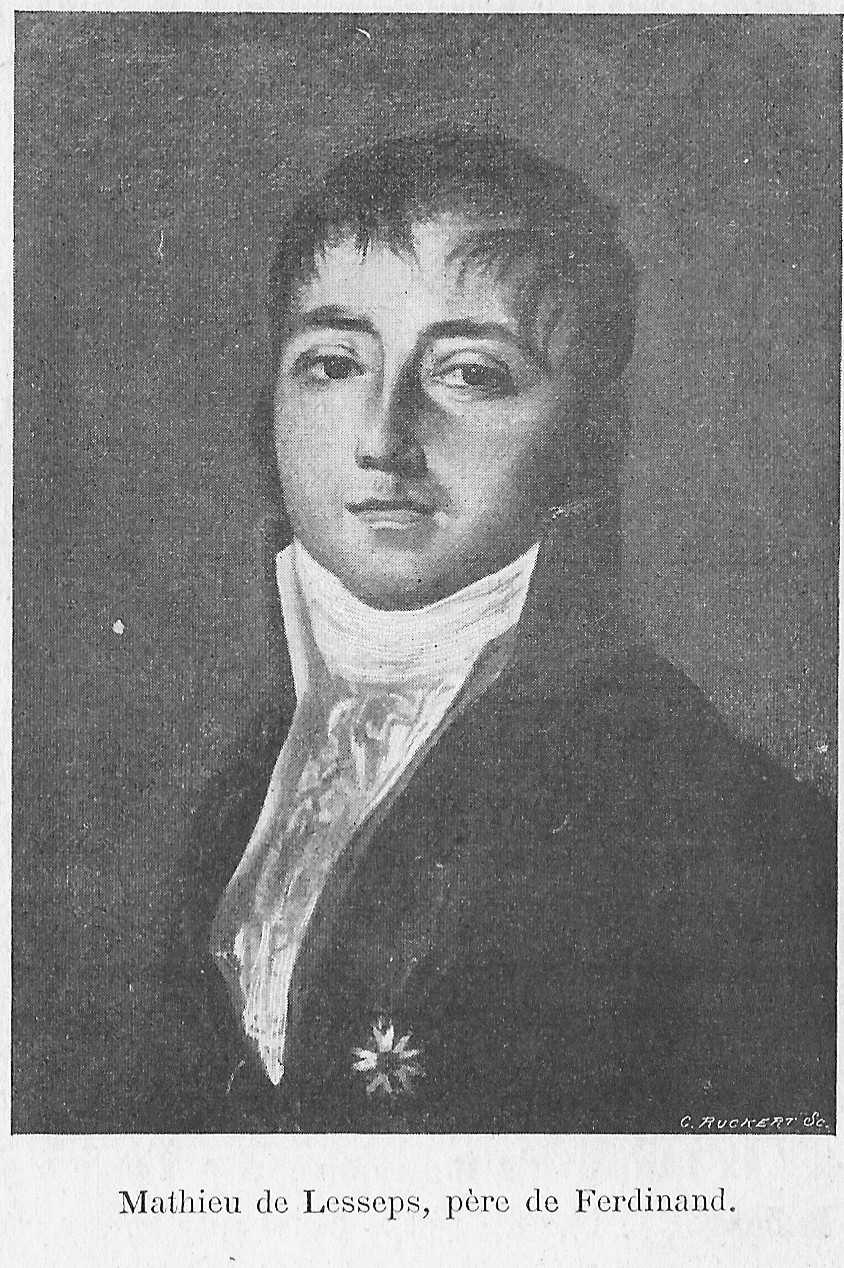 Ferdinand De Lesseps intime : portrait de son père